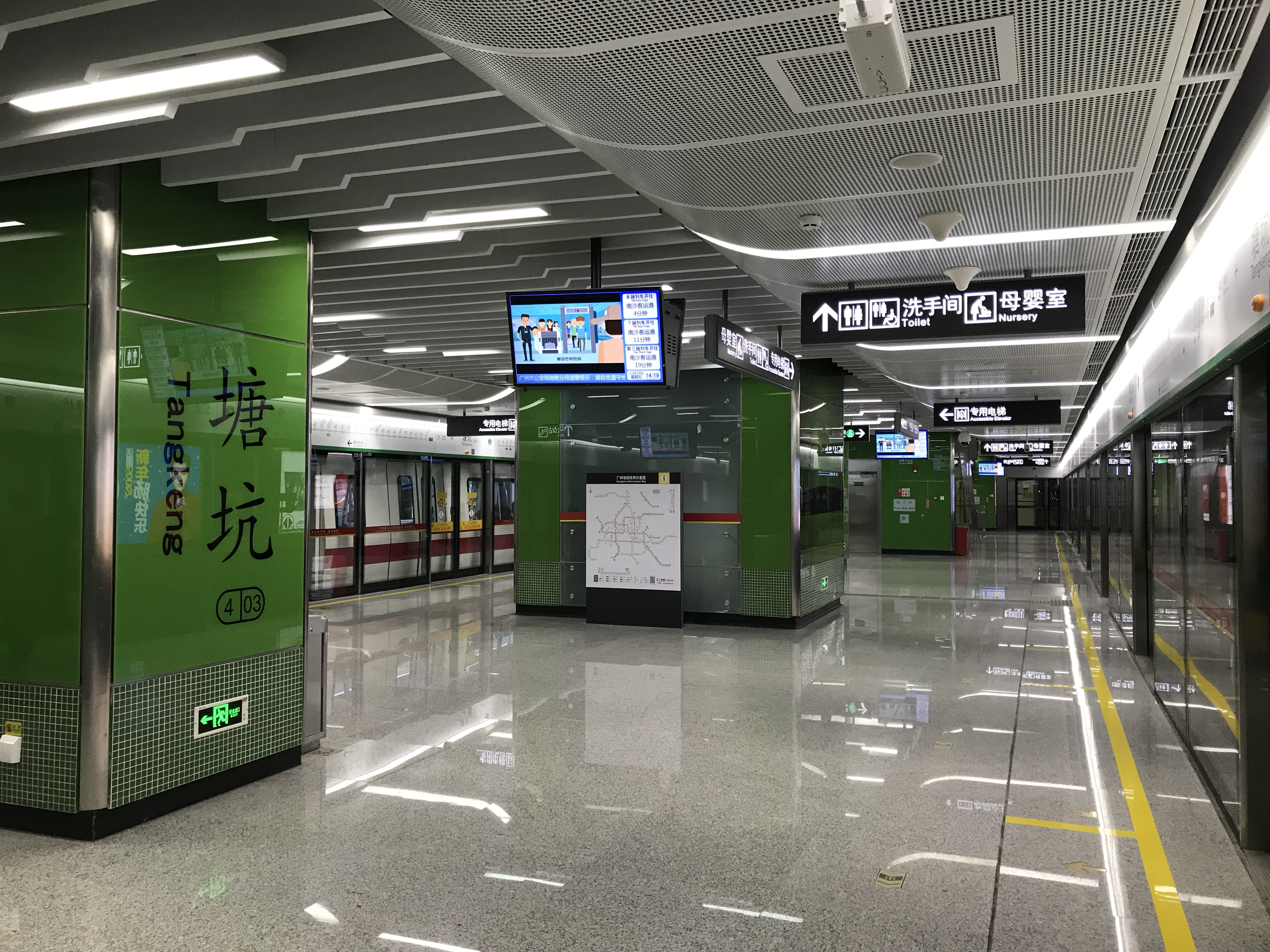 广州地铁塘坑站